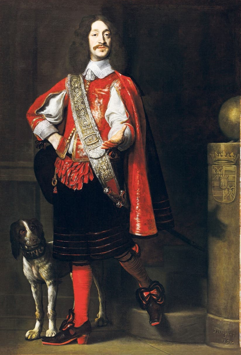 Ferdinand, Graf von Werdenberg gemalt von Samuel van Hoogstraten (1627–1678) im Festsaal des Winterthurer Rathauses (Museum Briner und Kern)